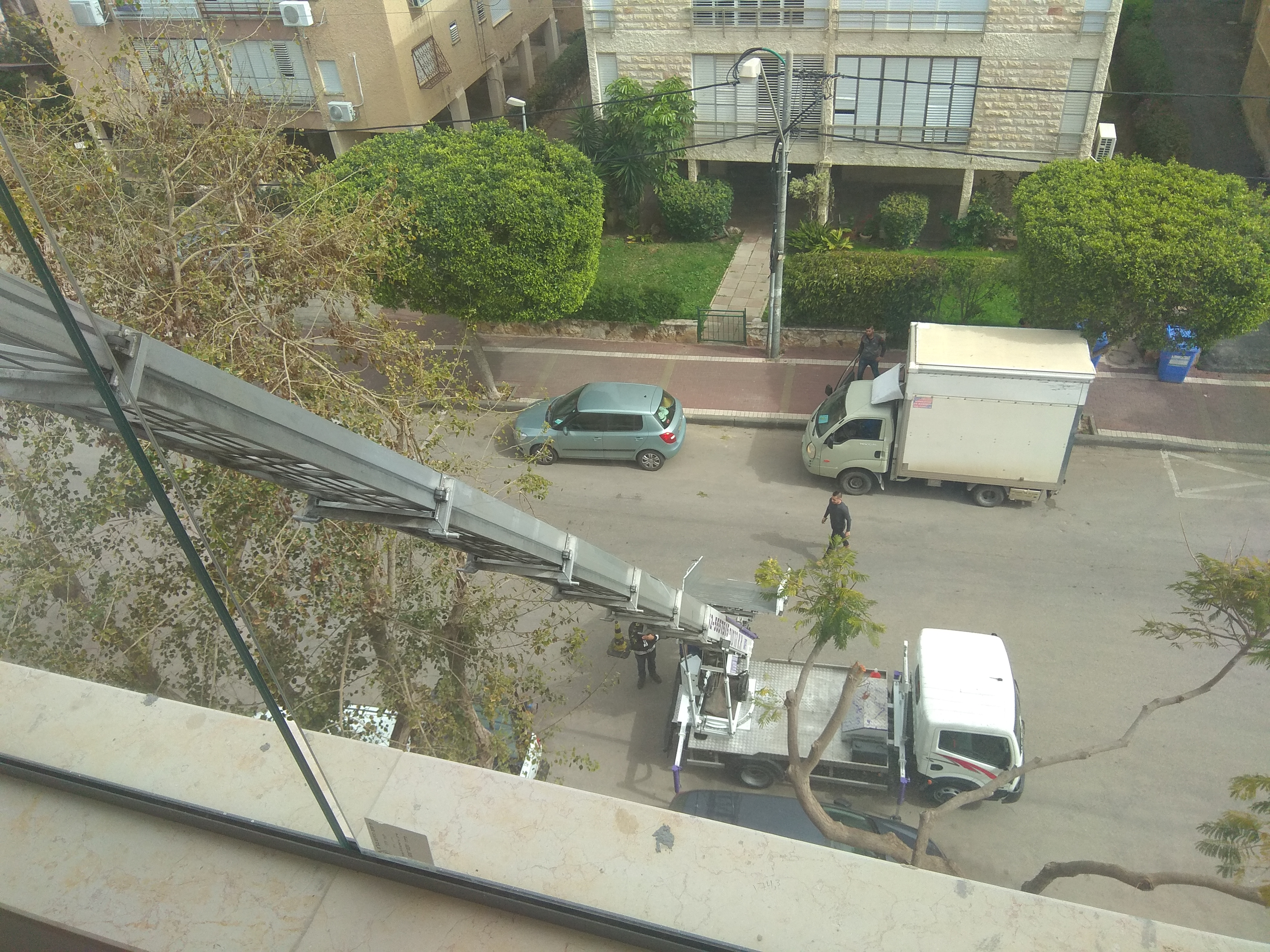 משאית מנוף מובילה תכולת דירה